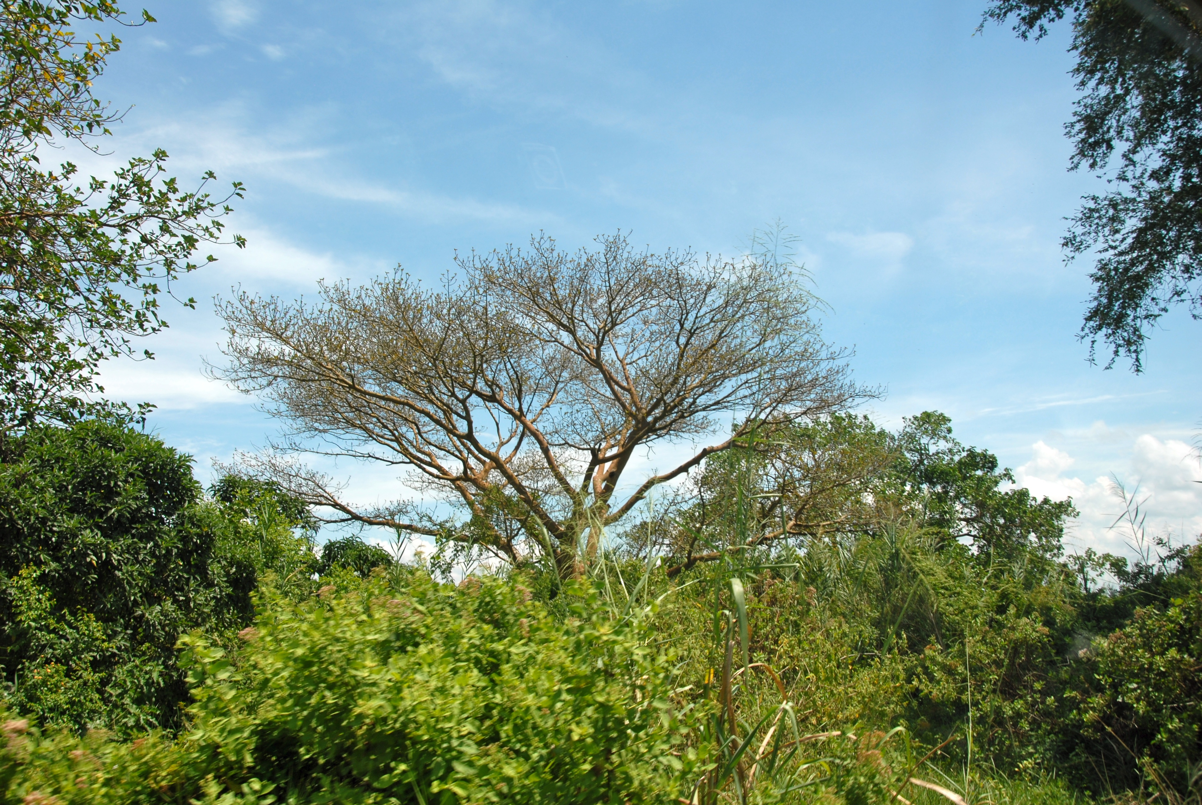 Rusizi National Park